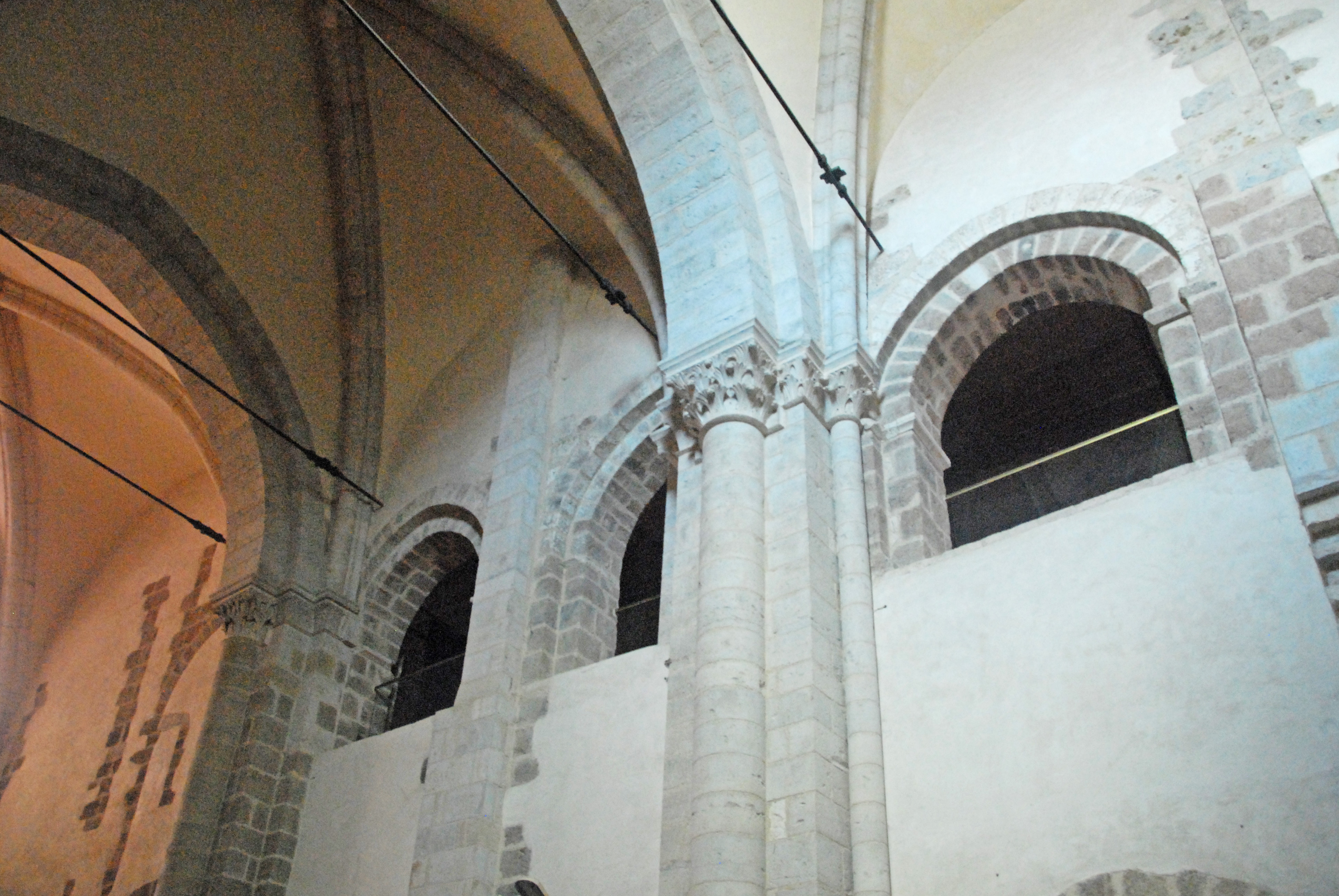 Neuvy_St.-Sépulcre, Basilika, Mittelschiff, SW-Wand, oben